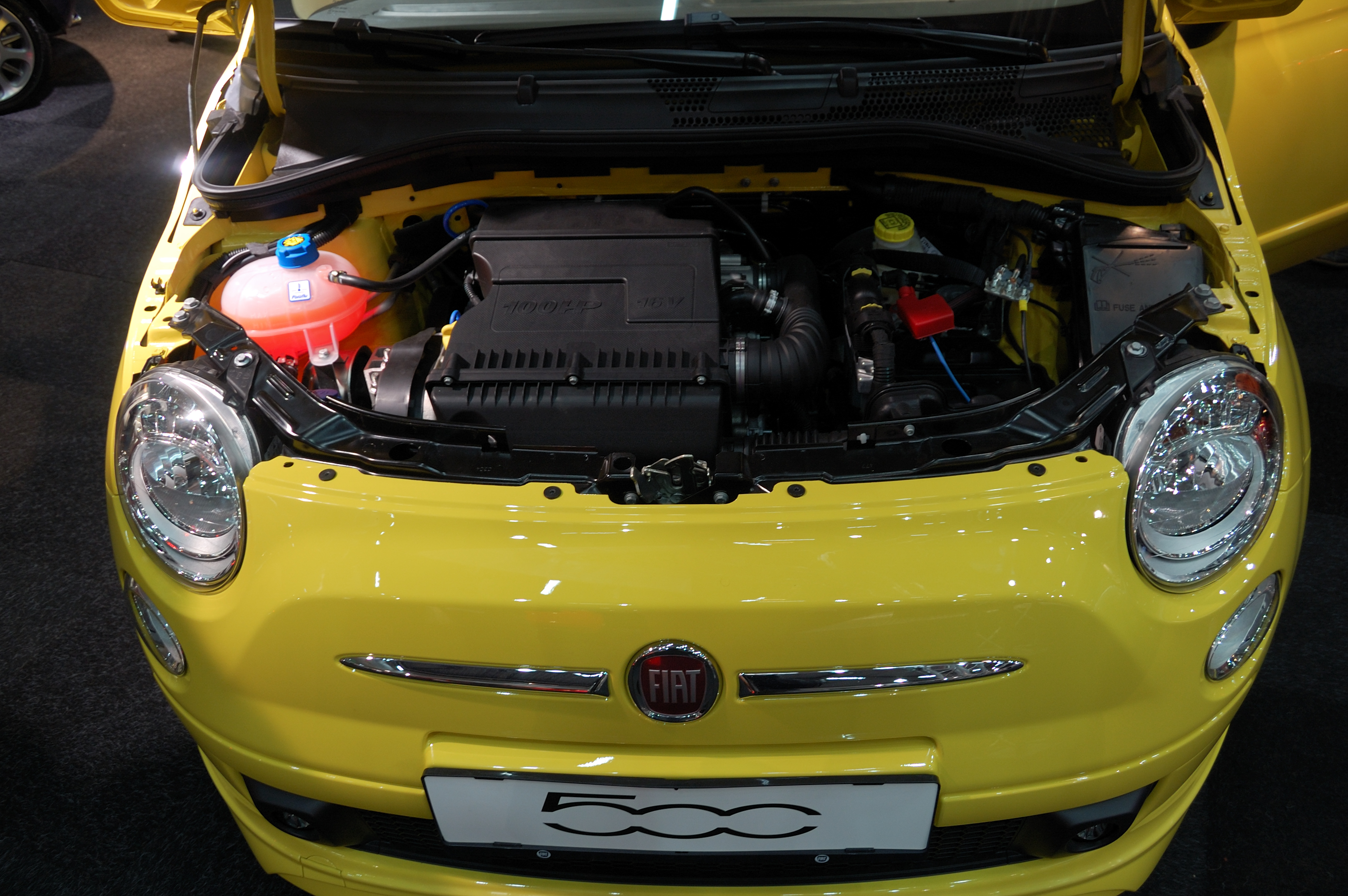 motore fiat 500